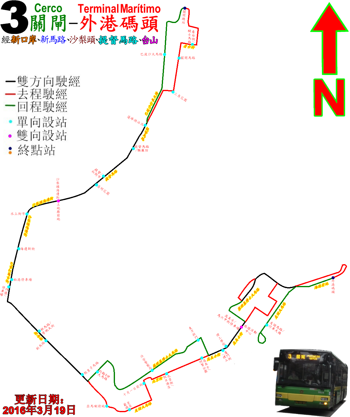 中文（香港）: 澳門巴士3號線的走線圖